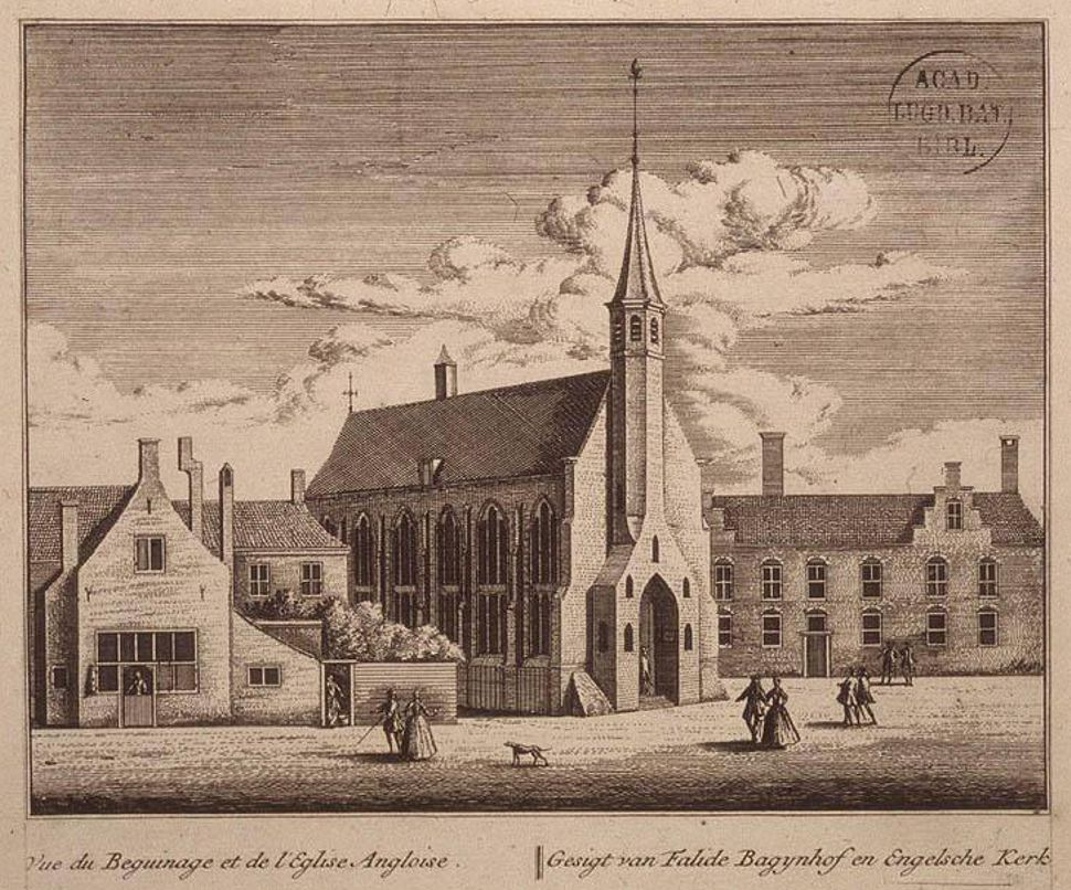 Faliede Bagijnkerk in Leiden, ca. 1732